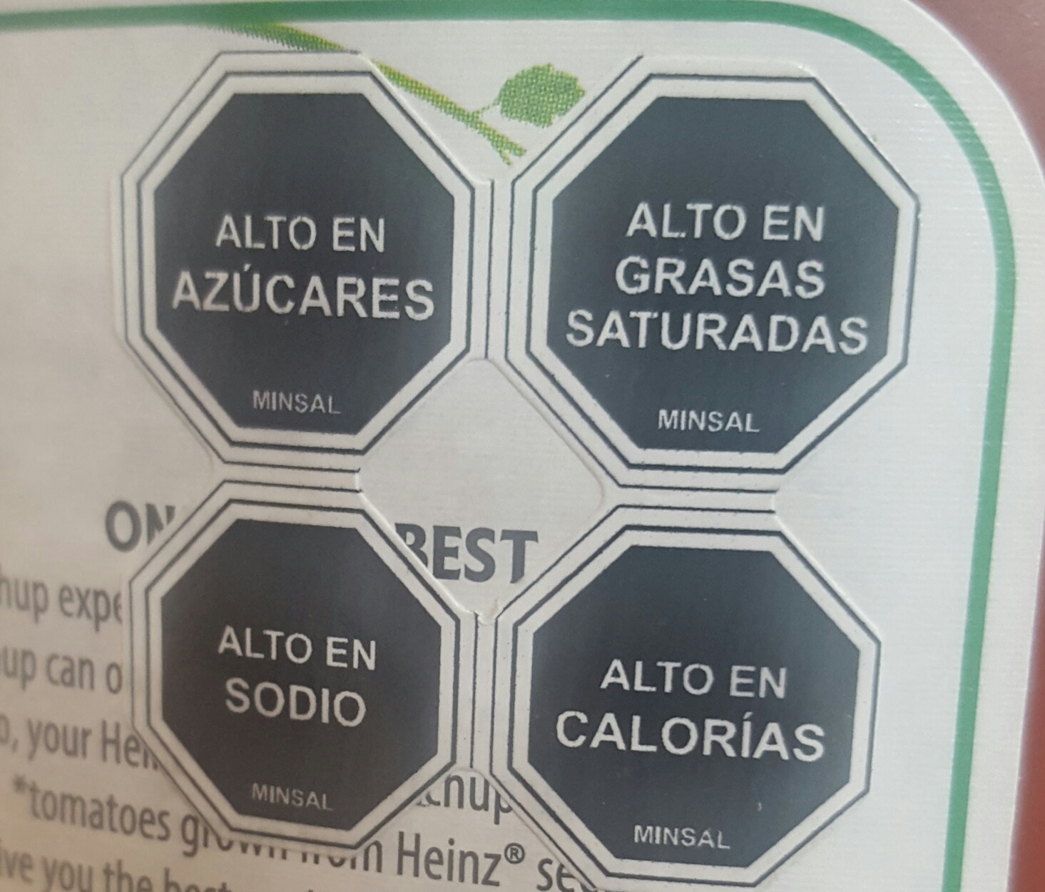 Logotipos de la ley de etiquetado de alimentos de Chile